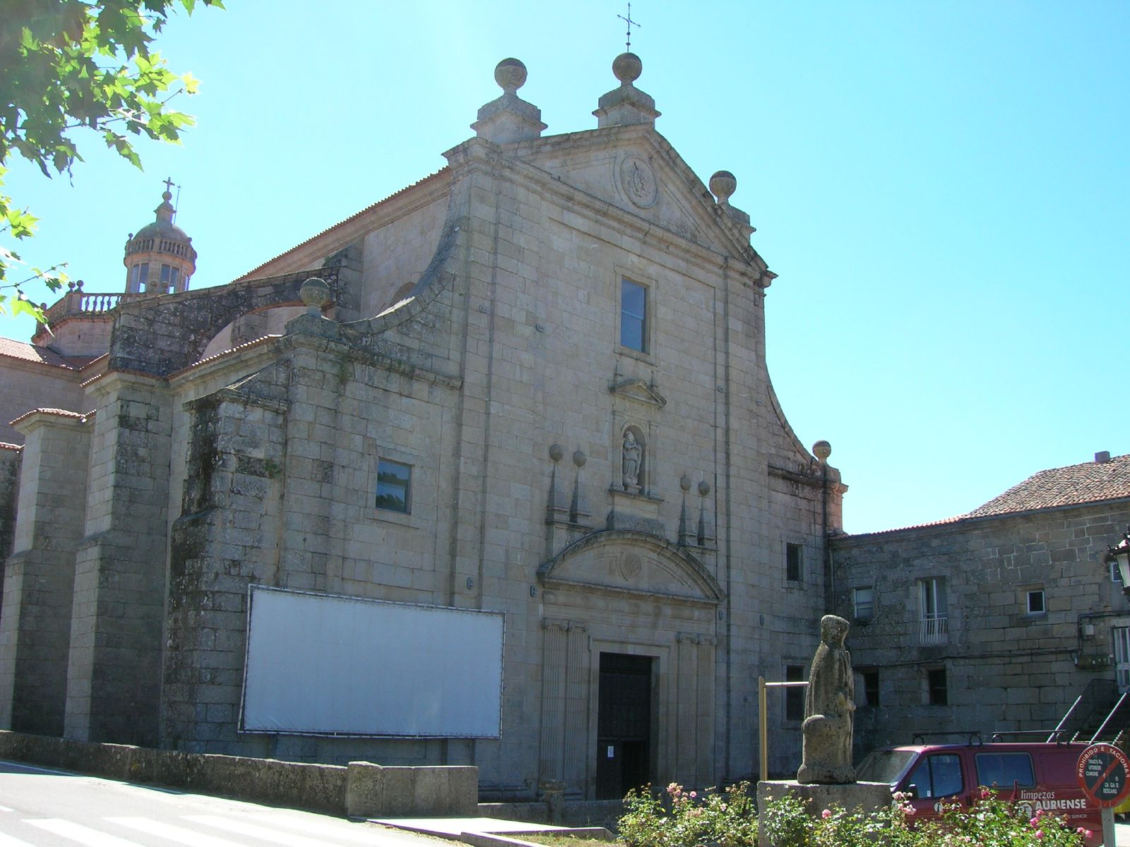 Monasterio de Montederramo. Fachada renacentista de la iglesia, terminada en 1607 según inscripción de la fachada. A la derecha, parte de la fachada del monasterio.